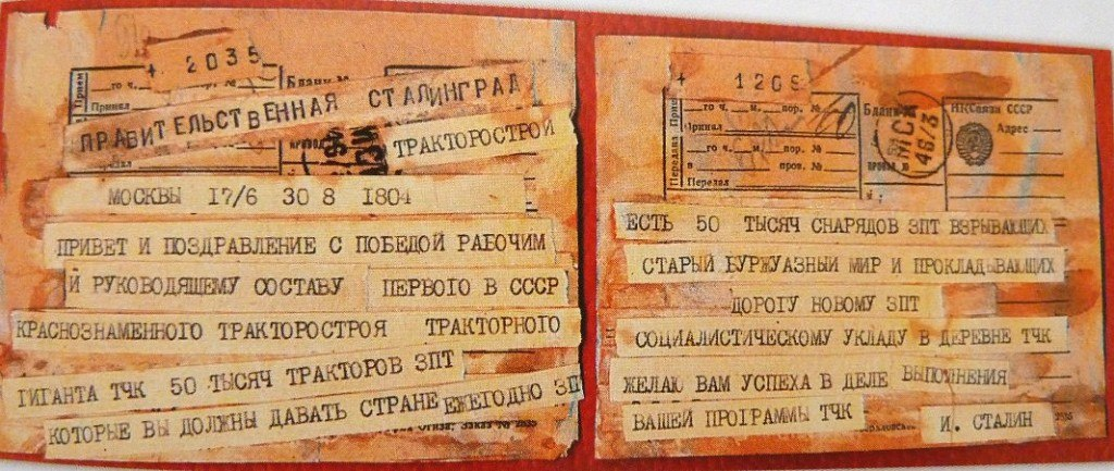 Телеграмма И.В. Сталина с поздравлением по случаю ввода в эксплуатацию Сталинградского Тракторного завода